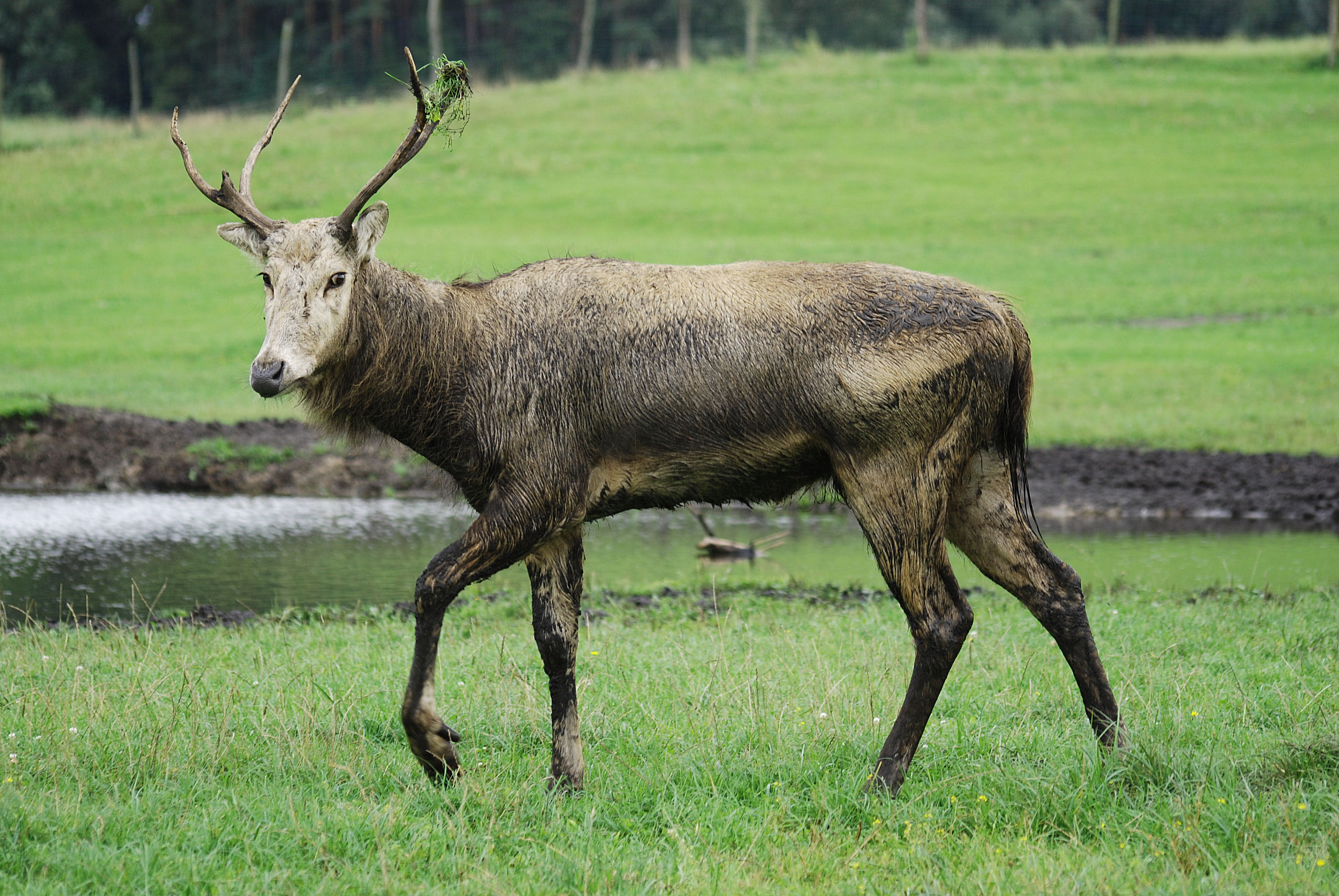 Elaphurus davidianus in Kadzidłowo